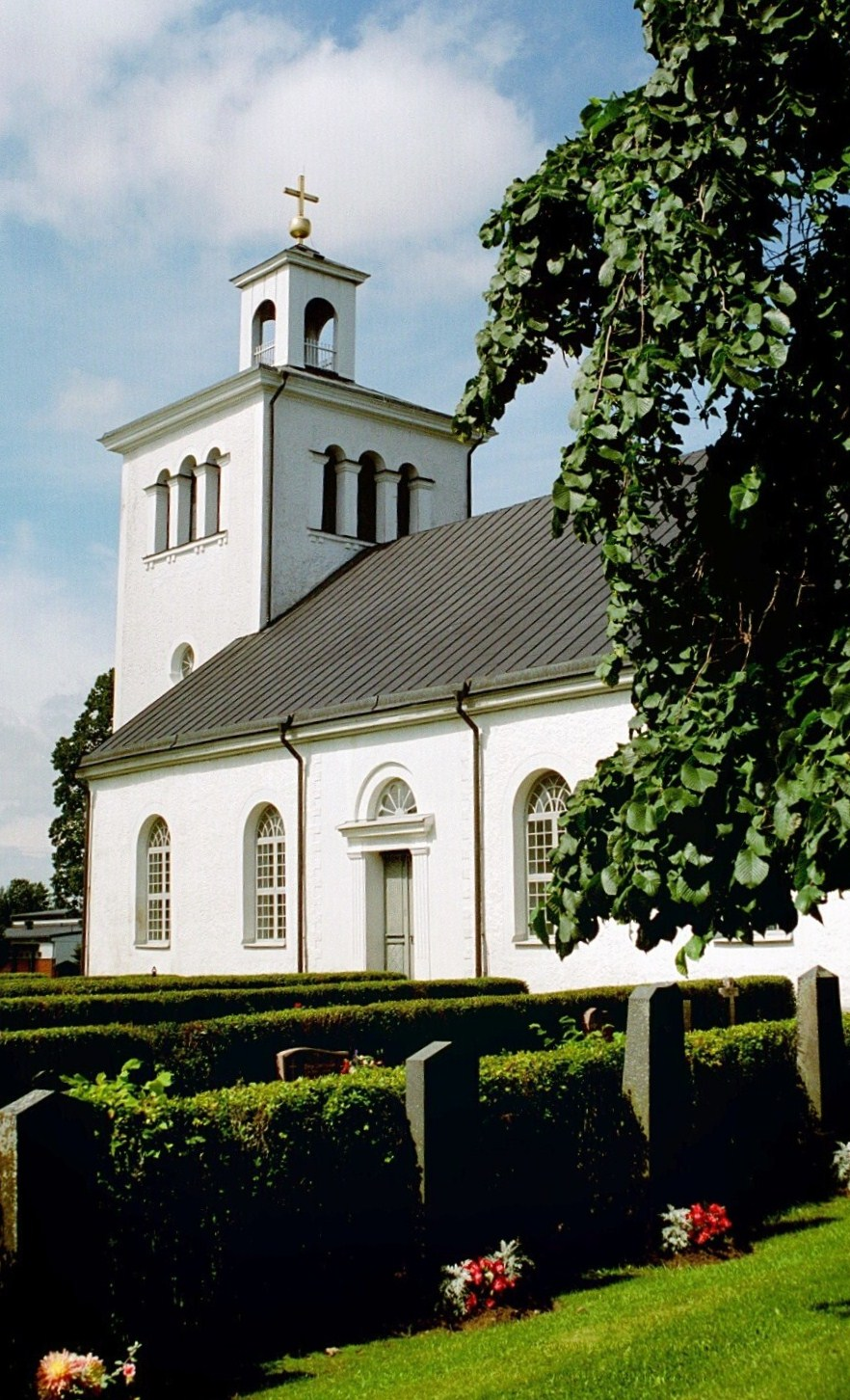 Skede kyrka.